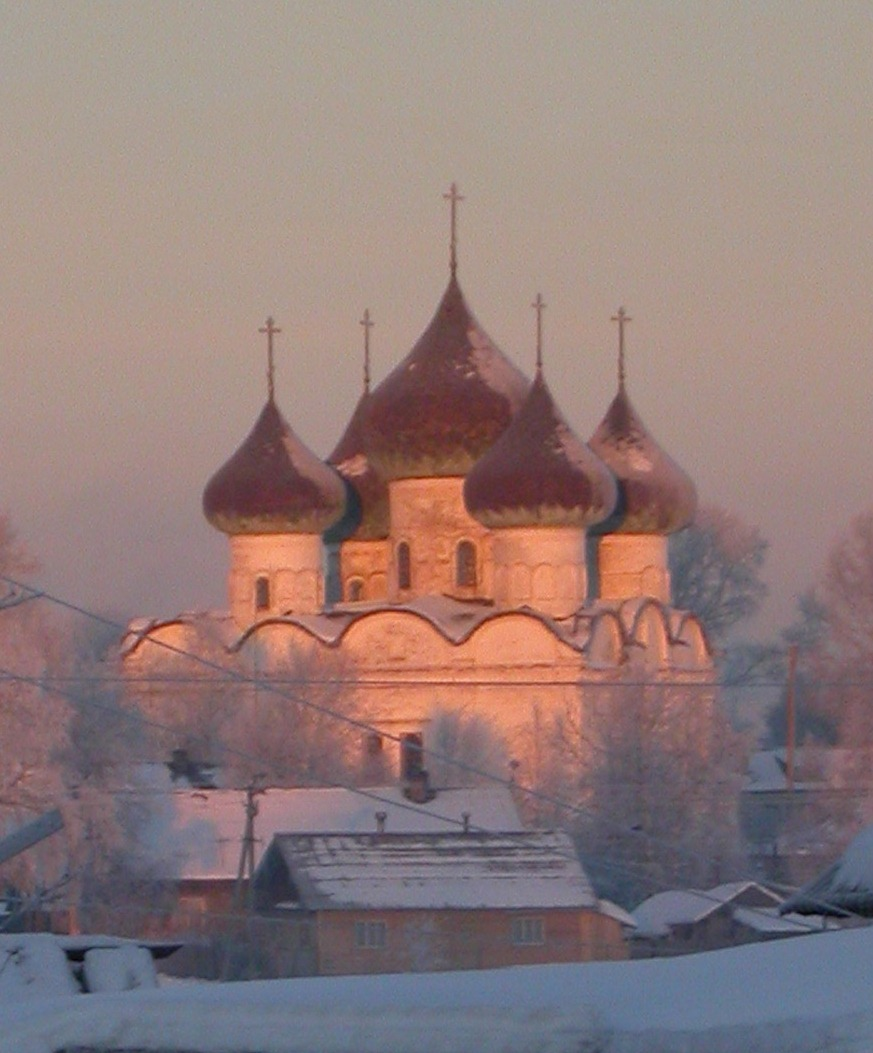 Воскресенская церковь города Каргополя